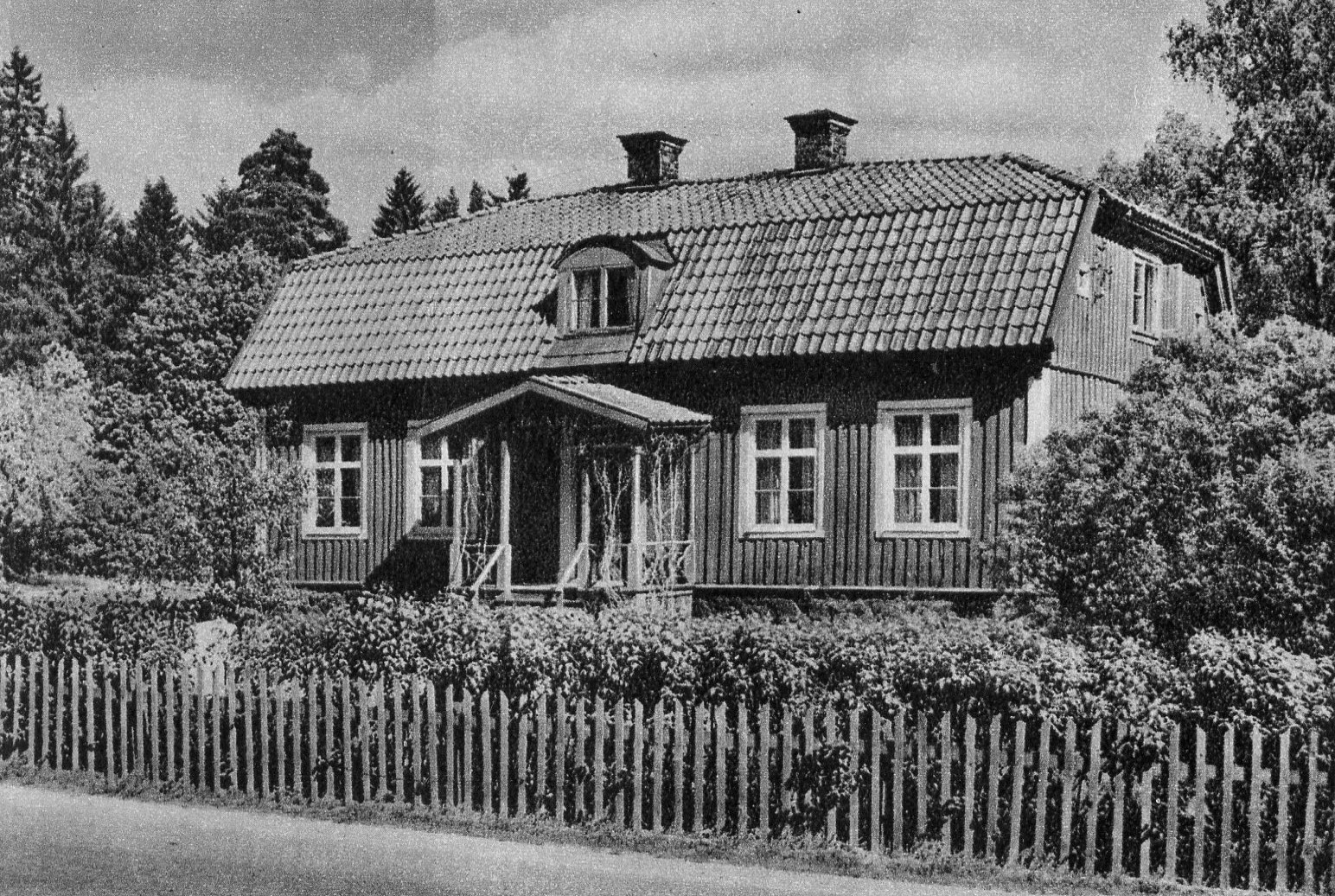 Snickarkrogen 1951